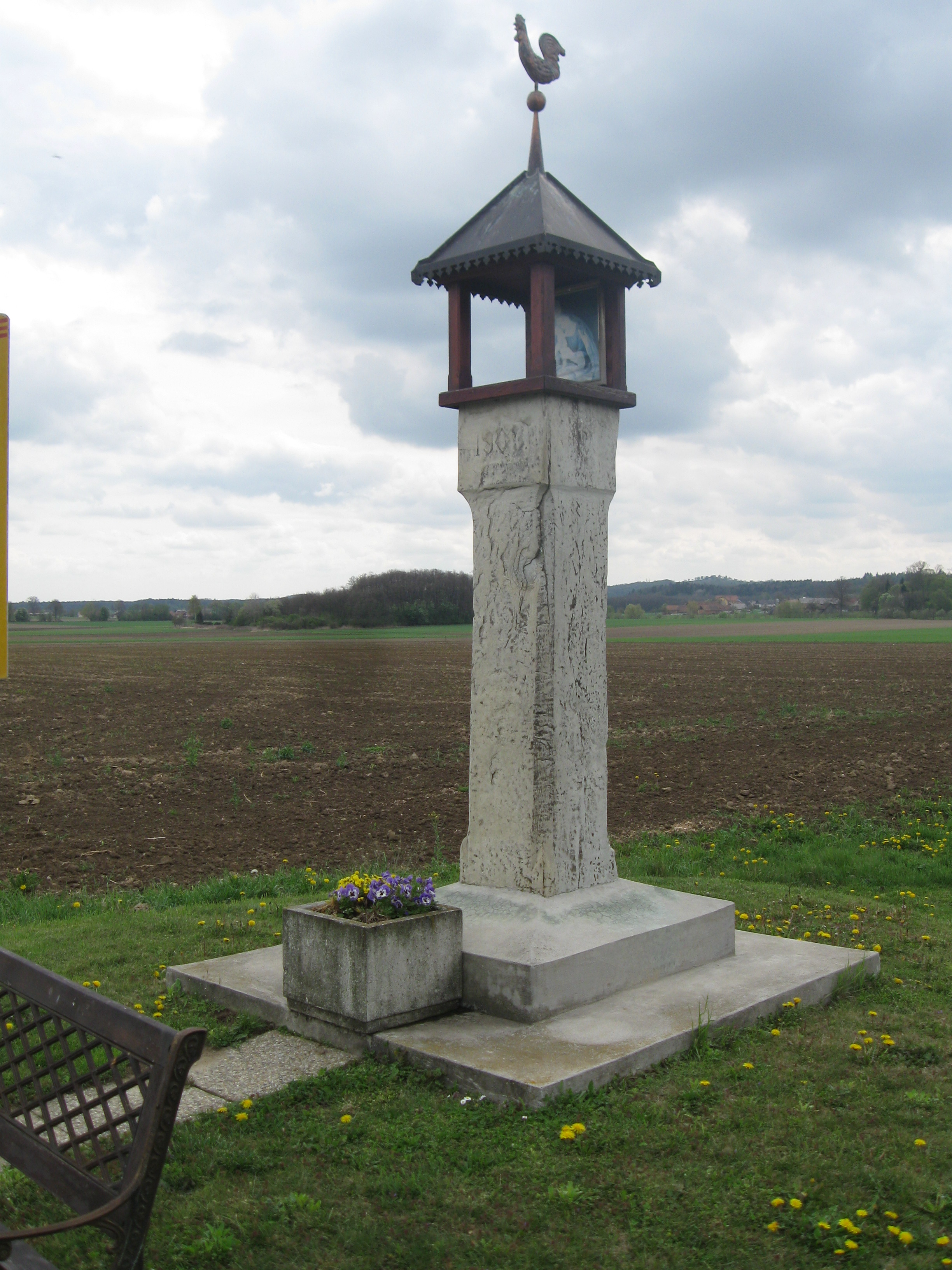 Poznogotsko stebrno kamnito kužno znamenje s posnetimi robovi na ajdovo zrno krasi leseno ohišje. Stoji na kamnitem podstavku.